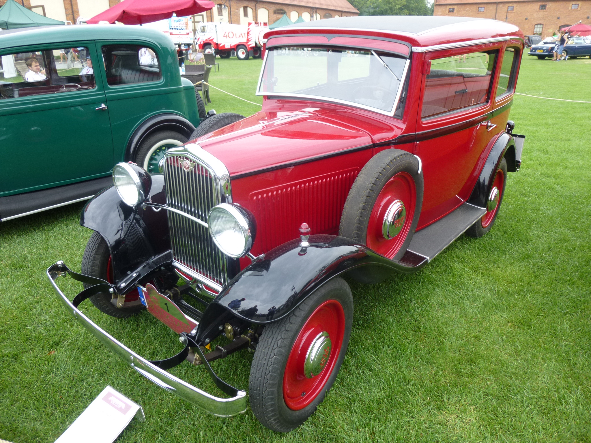 1933 Polski-Fiat 508 at 2015 Motoclassic Wrocław